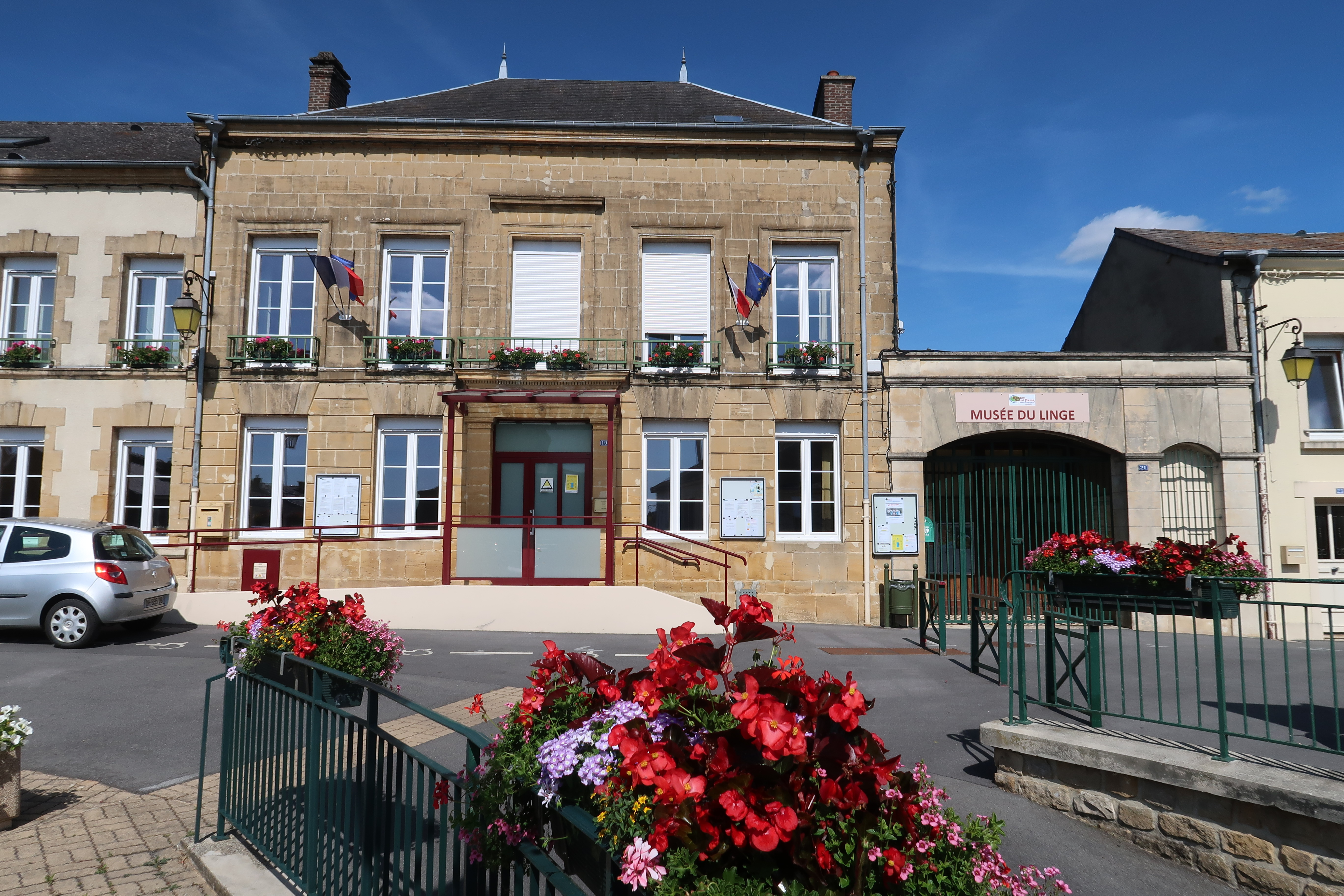 Montcy-Notre-Dame, mairie, musée du linge